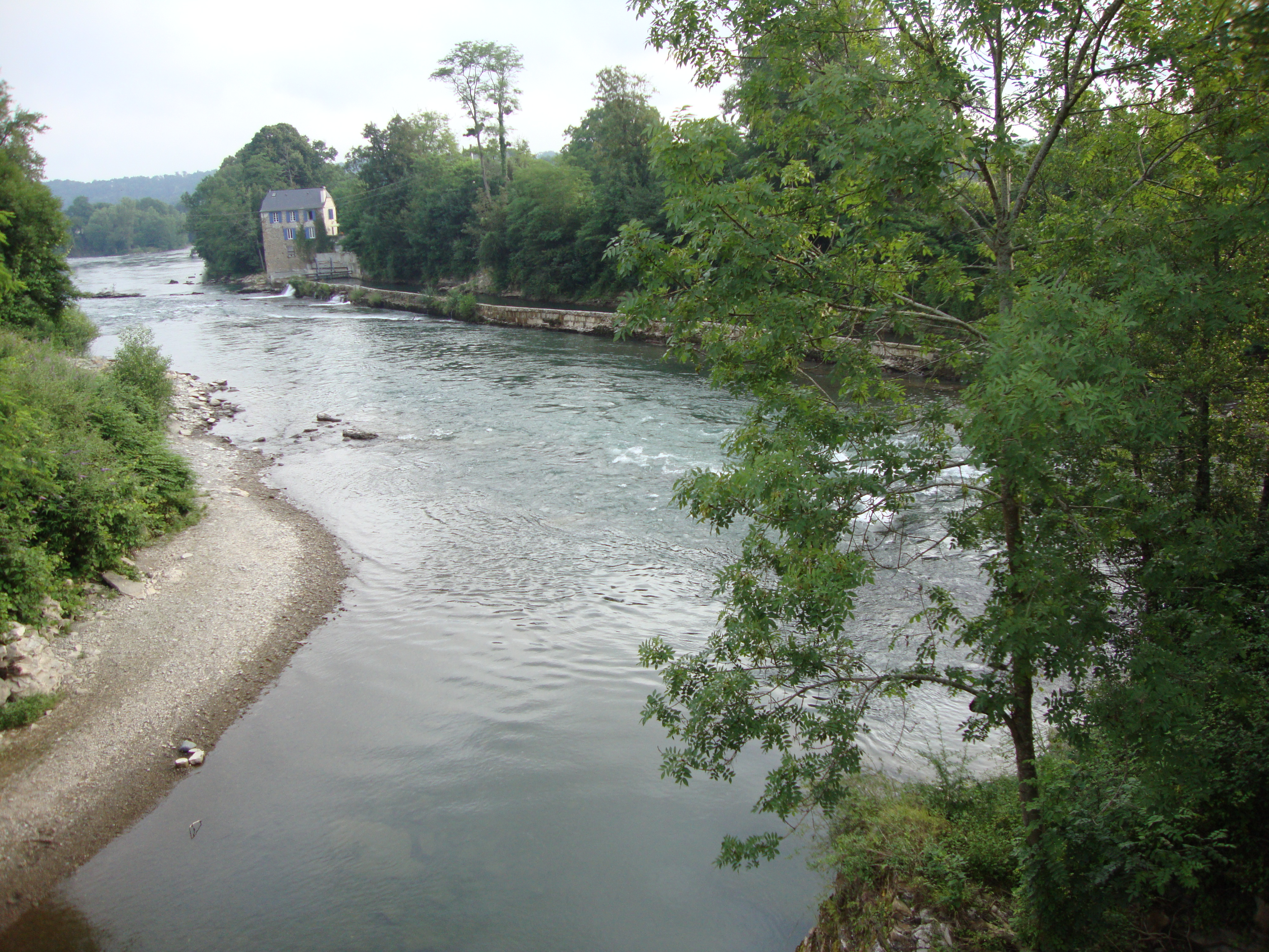 Moumour (Pyr-Atl, Fr) Confluent Vert (au premier plan) - Gave d'Oloron